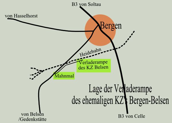 Lage der Verladerampe des ehem. KZ's Bergen-Belsen